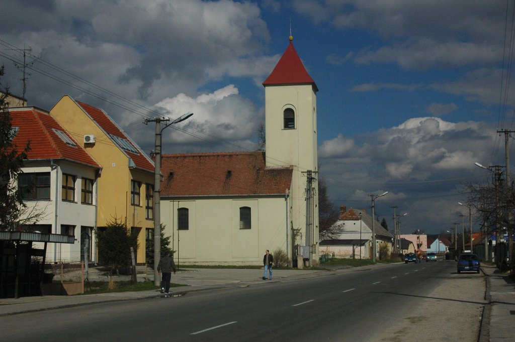 Senica-Čáčov, St. Mary church (1833)